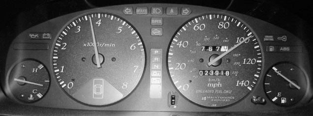 Dashboard